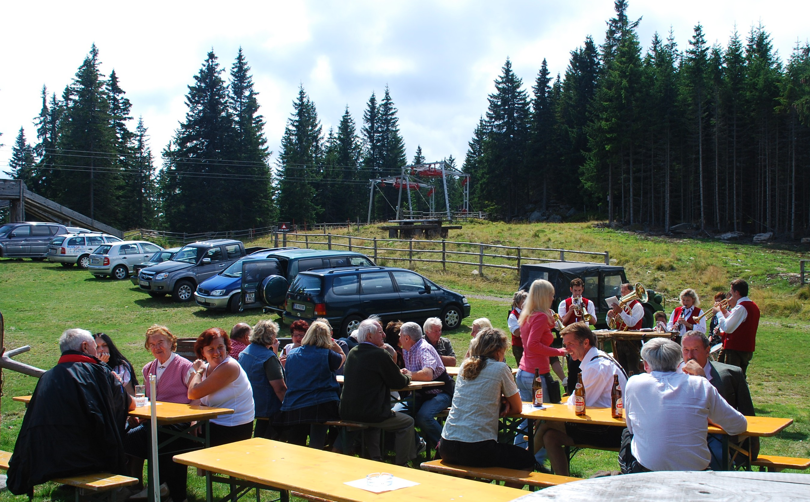 Am Hebalmkirtag bei der Gipfelhütten auf der Stocker Alm